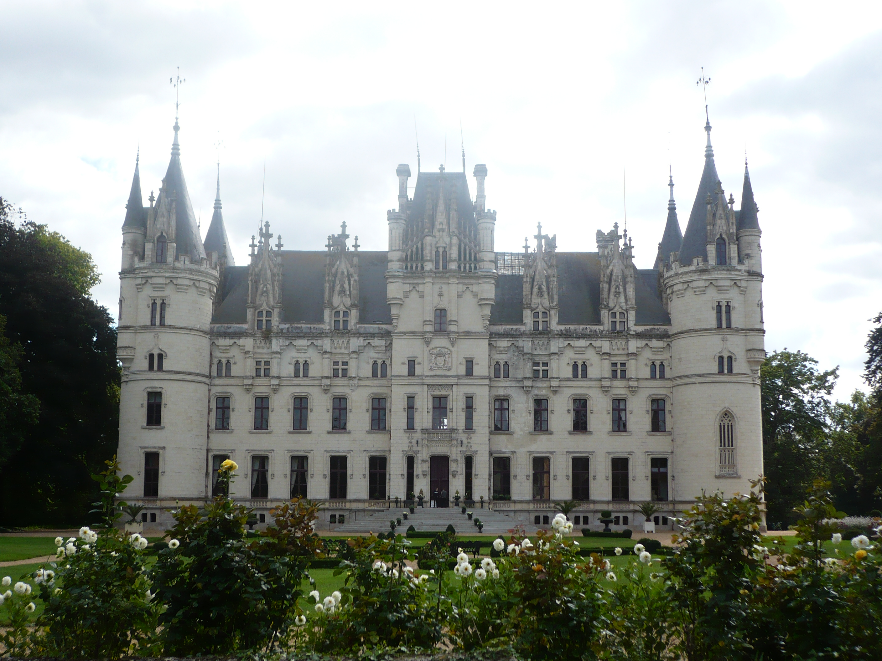 Façade du château de Challain-la-Potherie